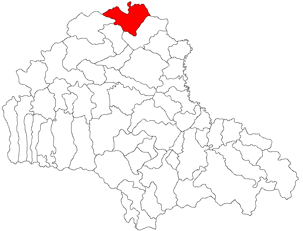 Categorie:Hărţi ale judeţului Braşov